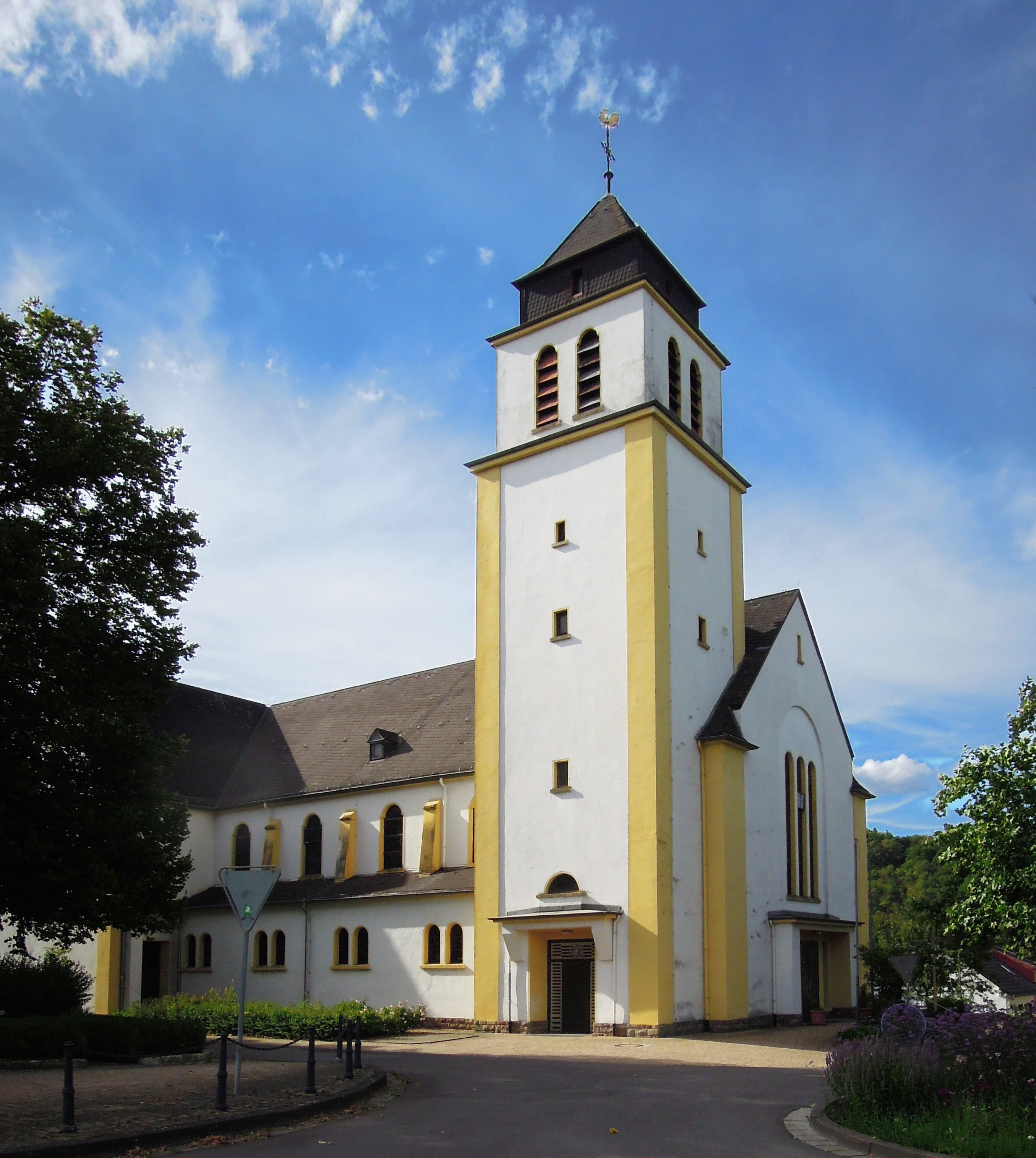 Pater-Nilles-Straße, kath. Pfarrkirche St. Konrad, 1934–36 von Josef Monz (Einzeldenkmal)